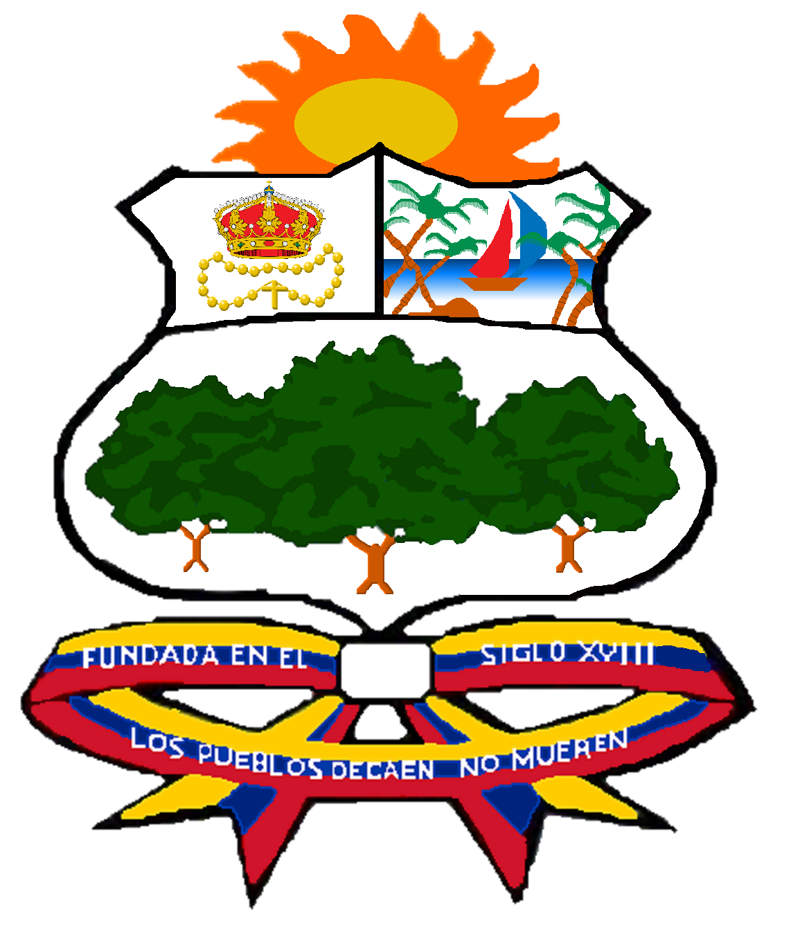 Escudo de armas del Municipio Cabimas, estado Zulia, Venezuela